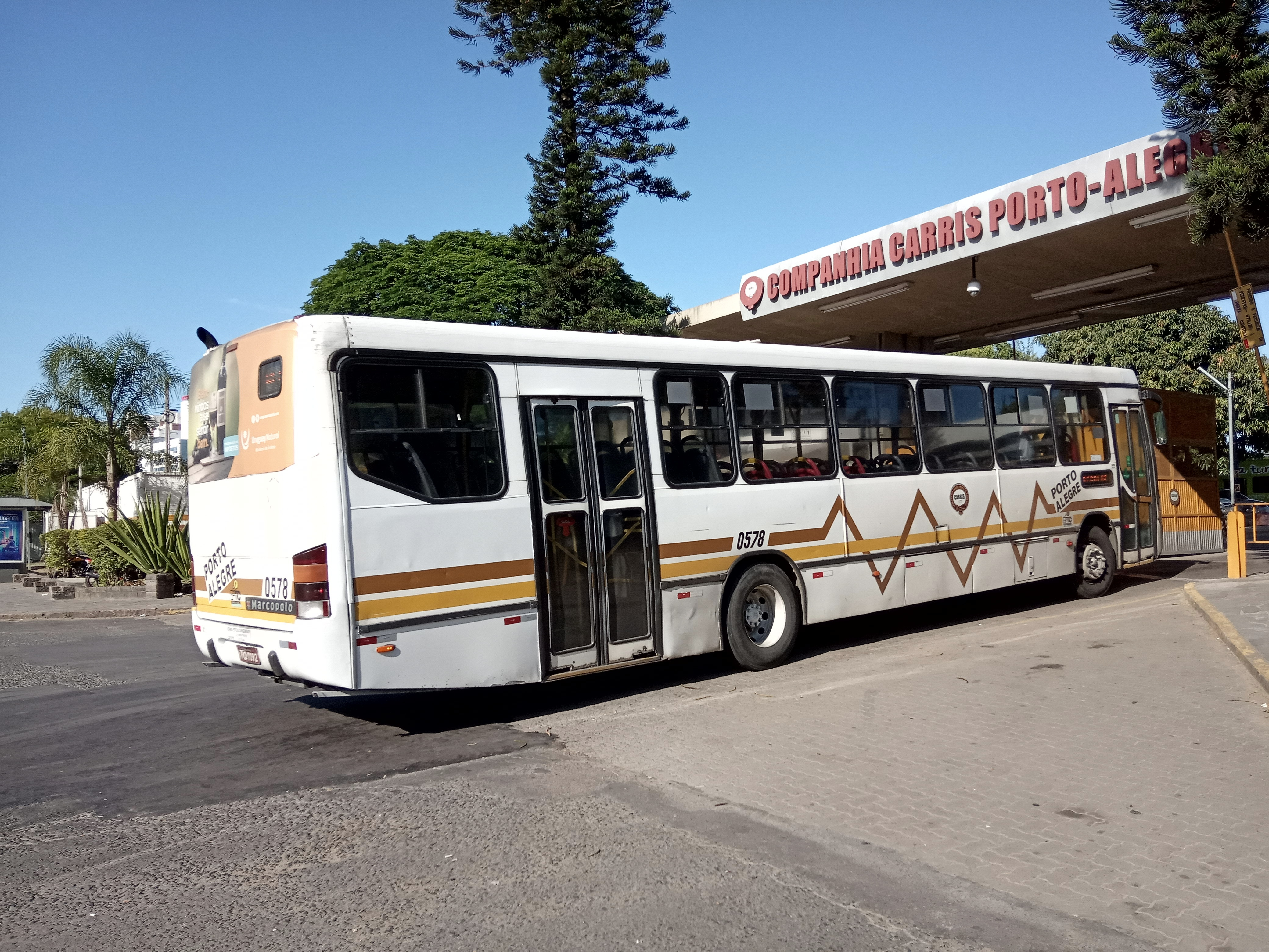 Veículo ano 2006/2007, 13 anos de vida útil na Carris.